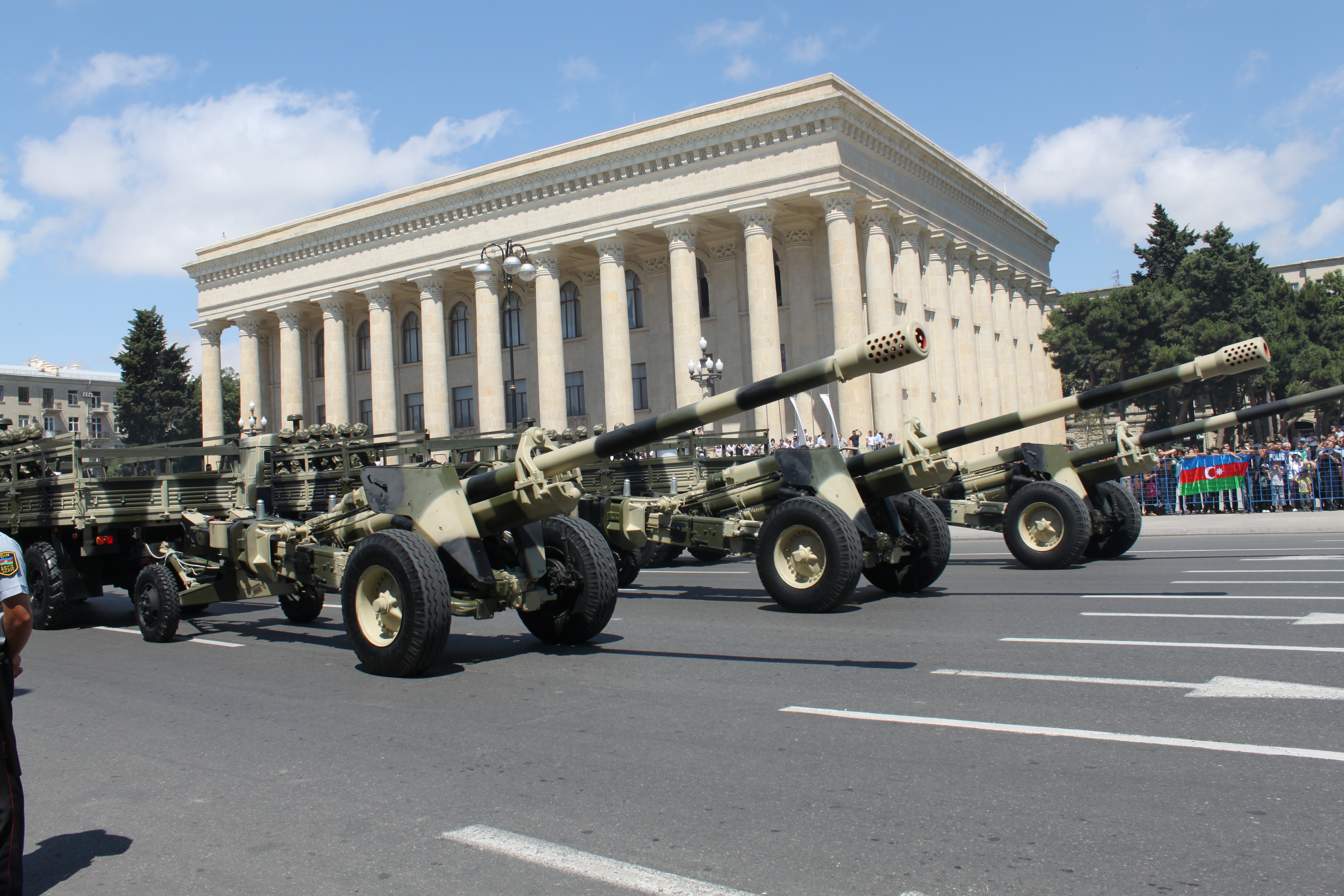 Военный парад в Баку в день вооруженных сил Азербайджана.